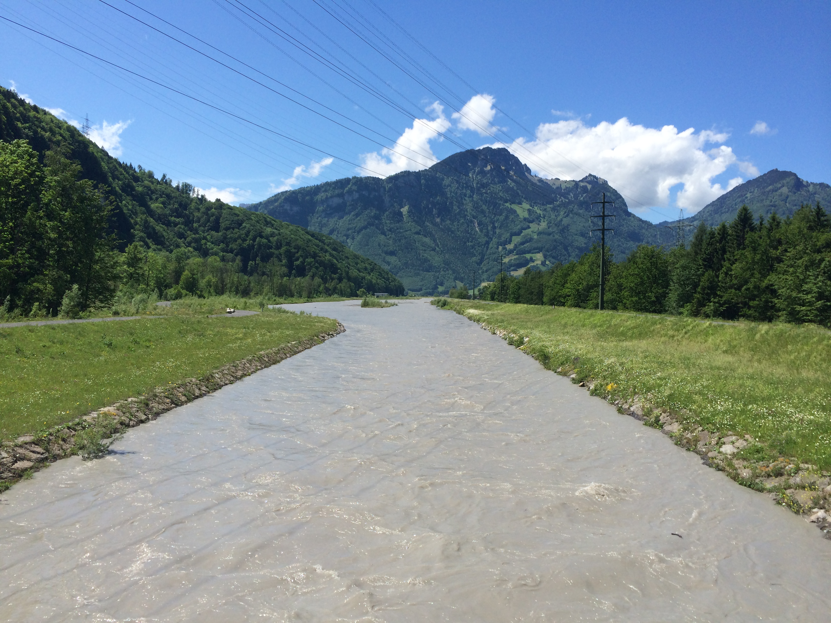 Die Linth vor der Einmündung in den Walensee Richtung Norden